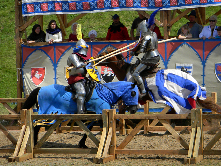 Фестываль Спадчына вякоў у Мірскім замку